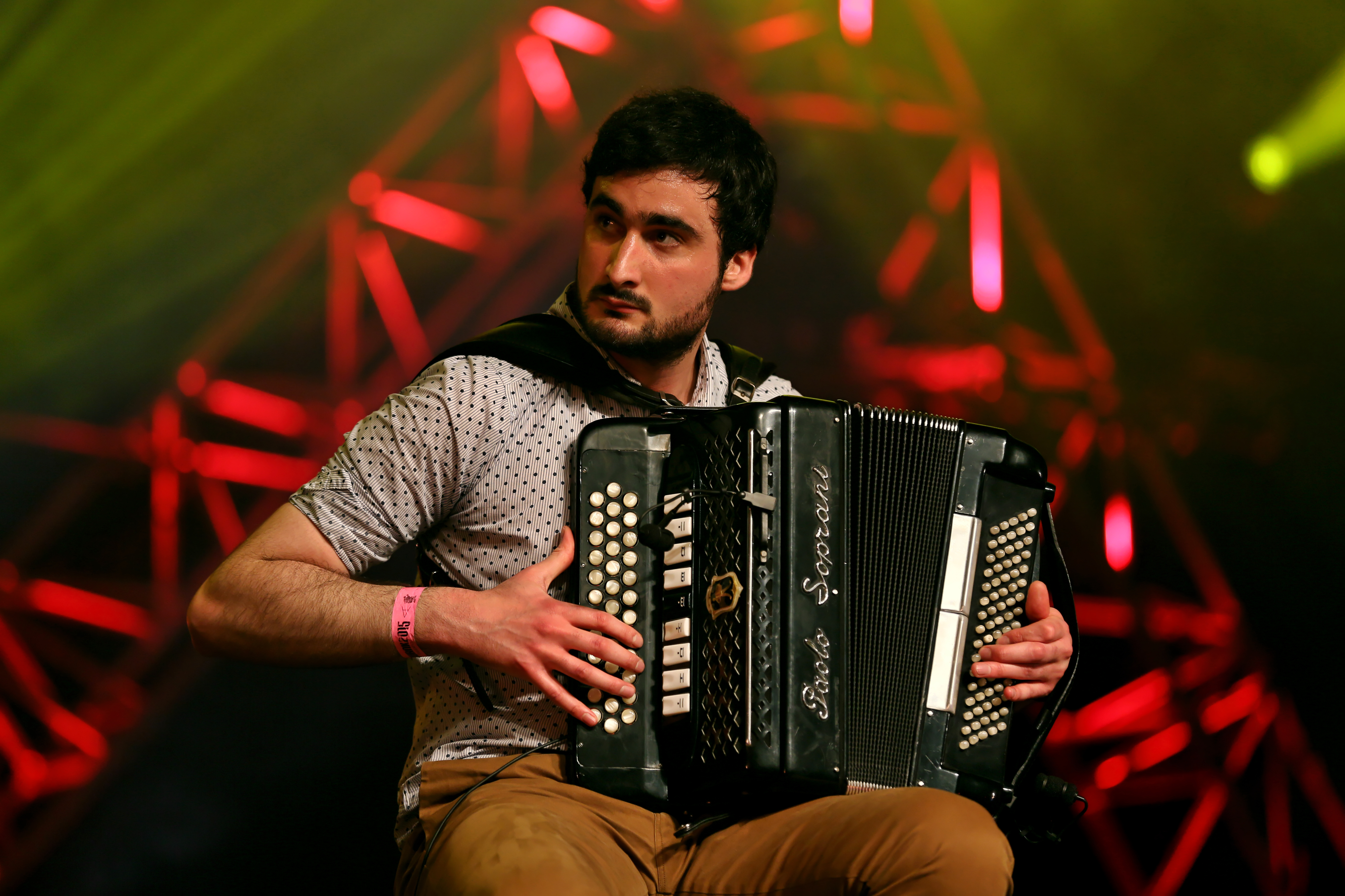 Landat-Moisson Quintet en fest-noz lors du festival Yaouank le 21 novembre 2015 au Parc des Expositions de Rennes.